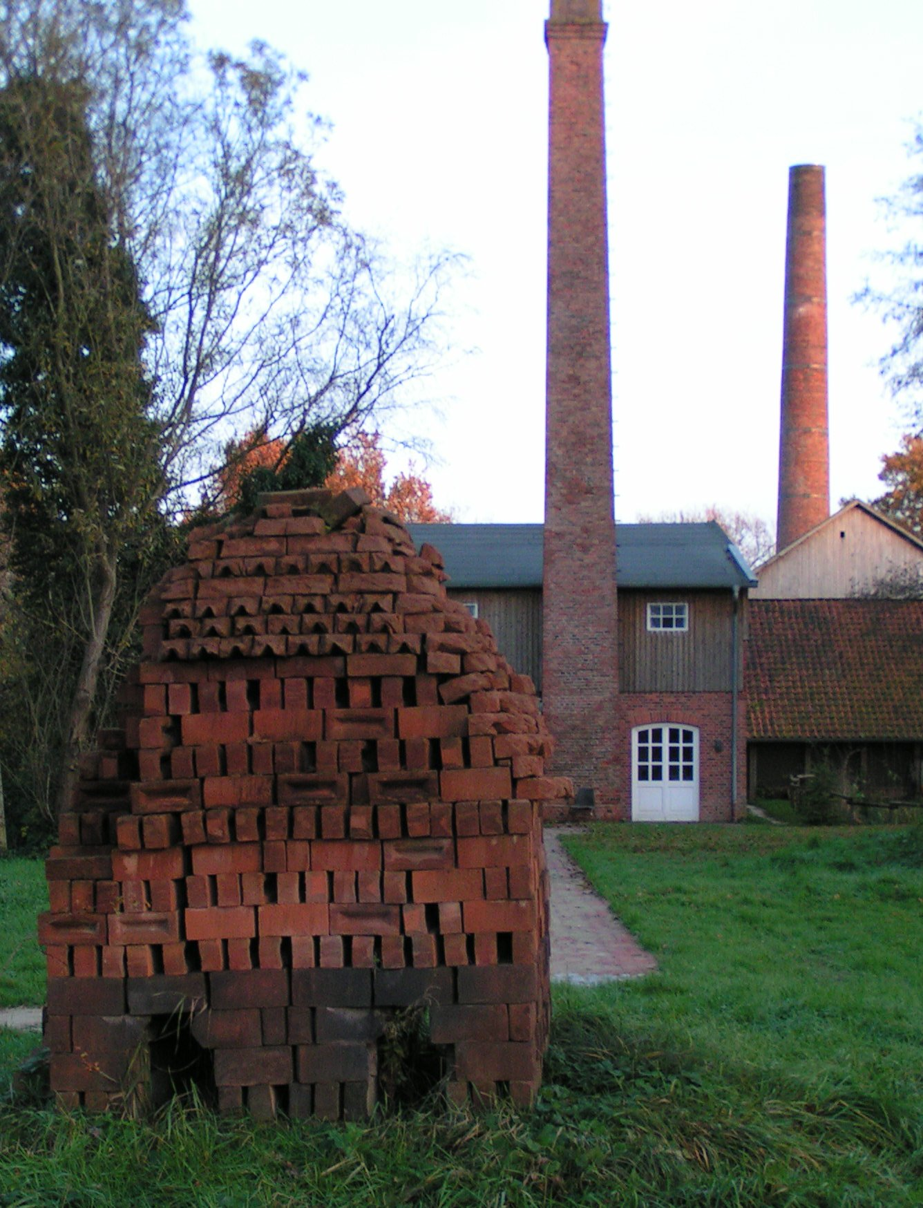 Ziegeleimuseum in Westerholt (Gemeinde Wardenburg, Landkreis Oldenburg, Niedersachsen)